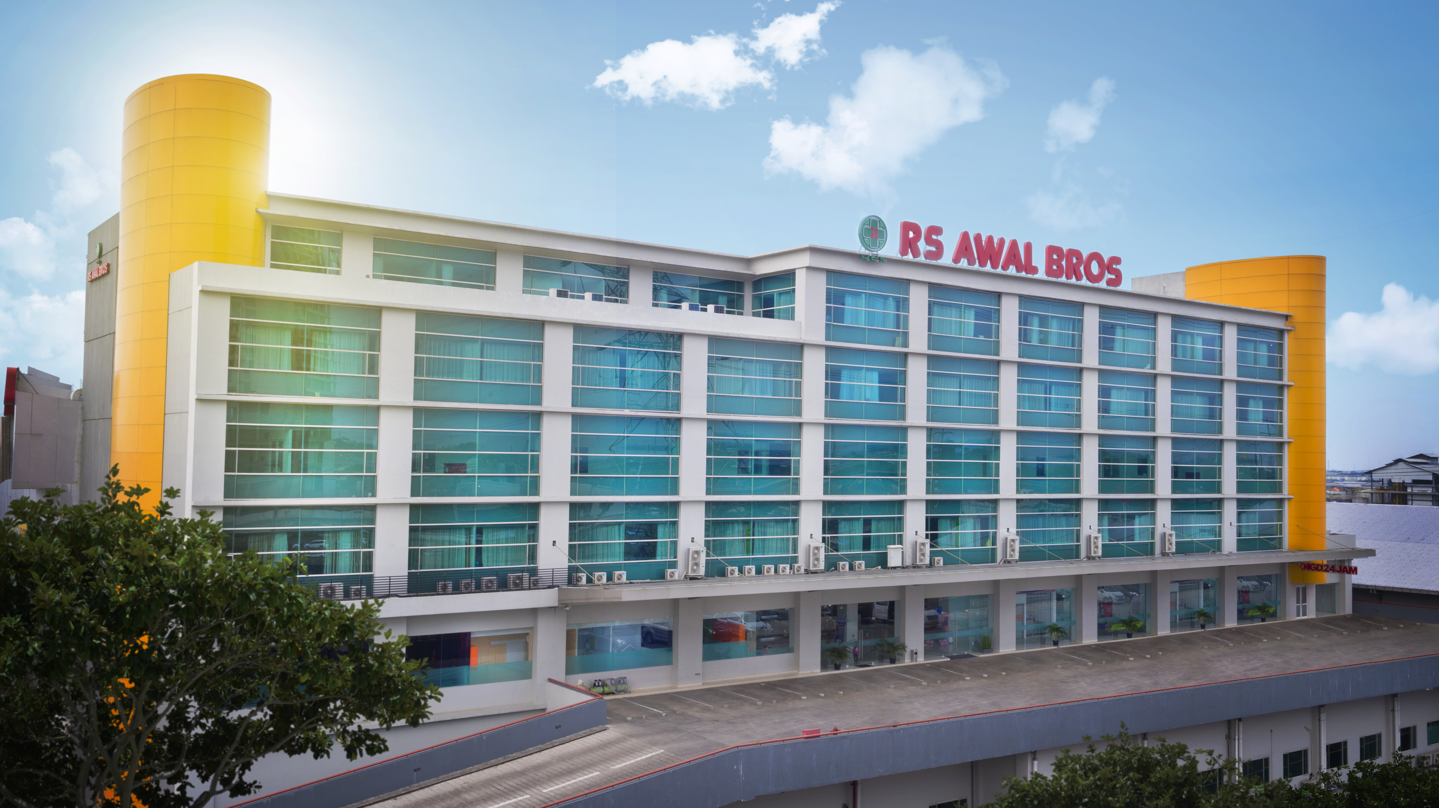 Foto Ilustrasi Rumah Sakit Awal Bros di Bekasi Timur